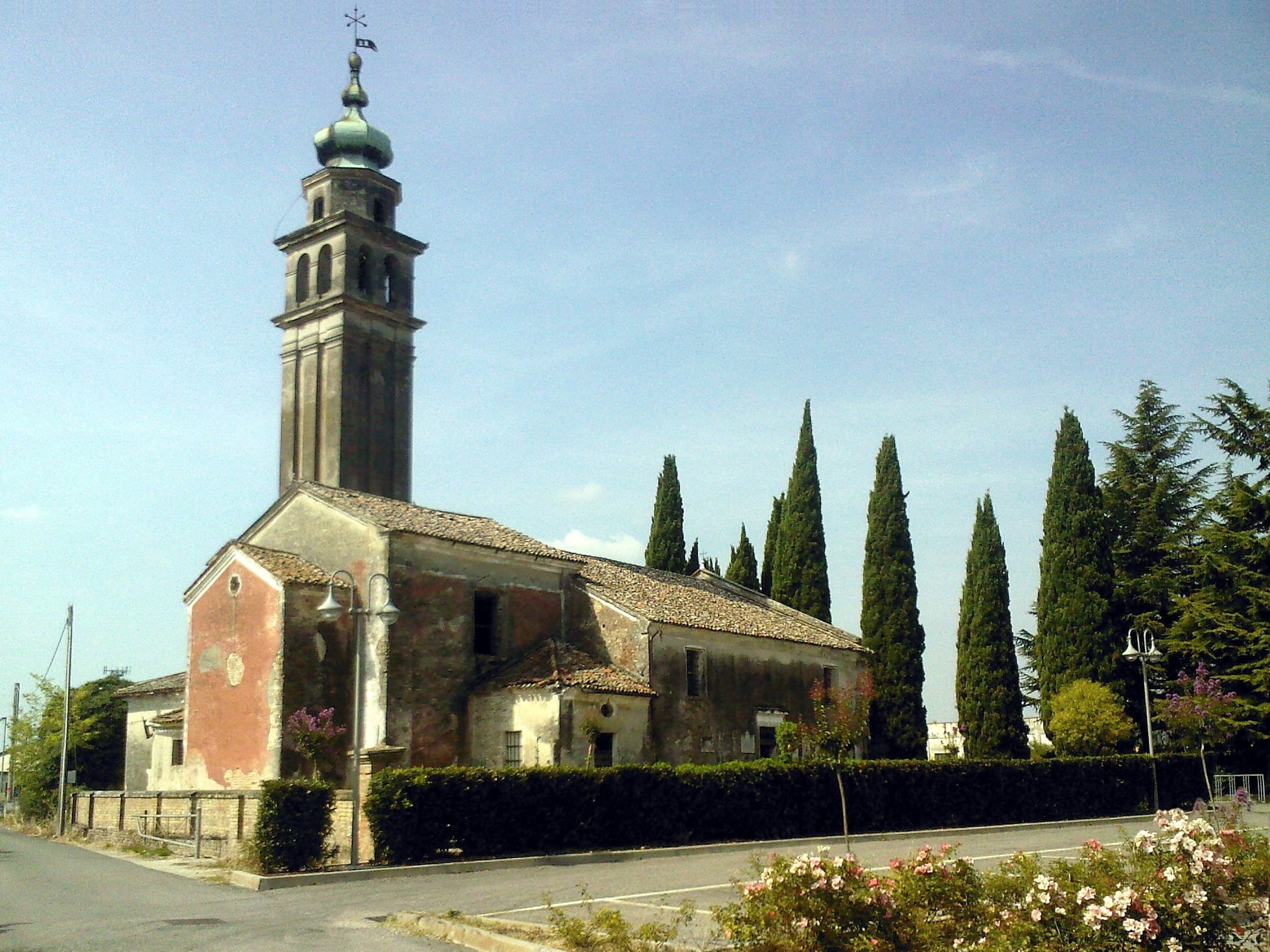 San Biagio di Callalta, la vecchia pieve di San Biagio.